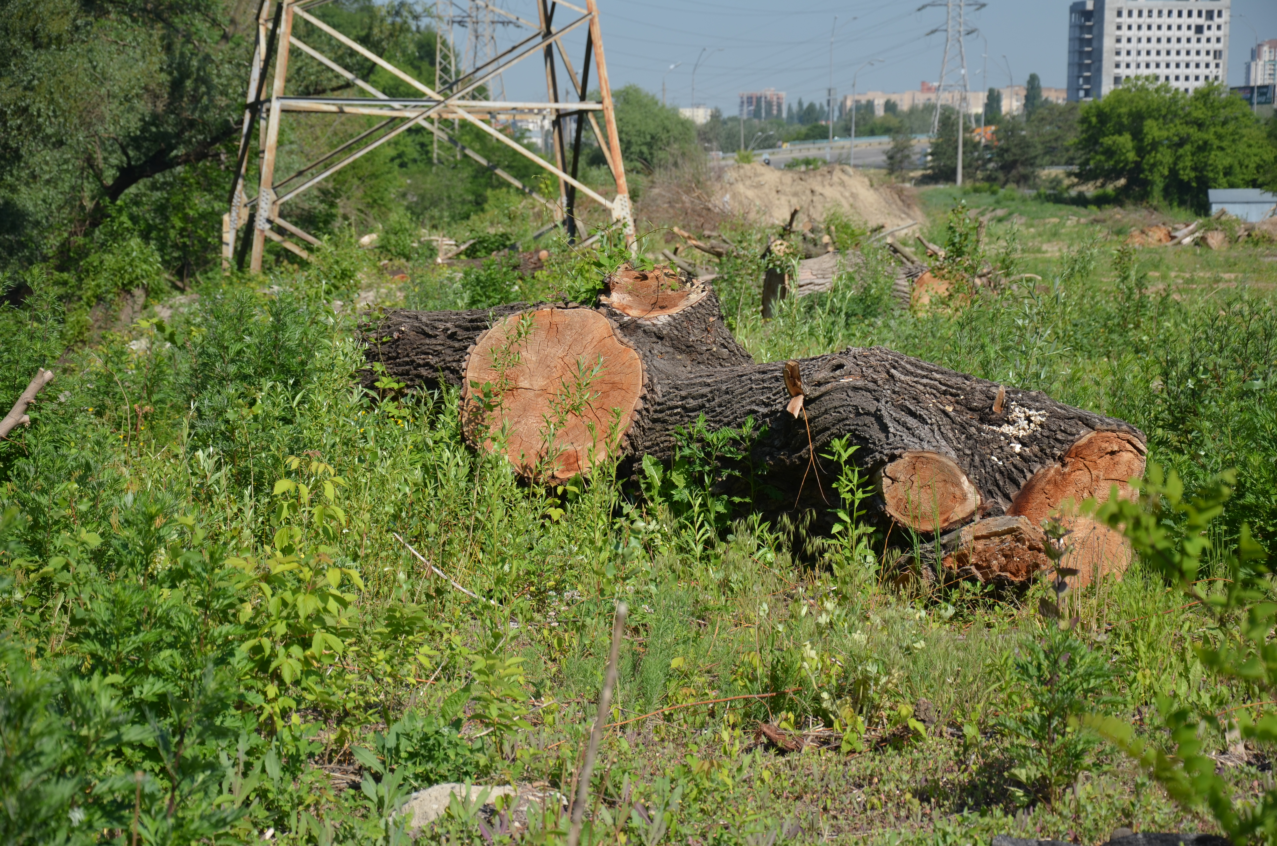 Природне русло р. Либідь, Голосіївський район, вул. Саперно-Слобідська (від колектора до Наддніпрянського шосе)